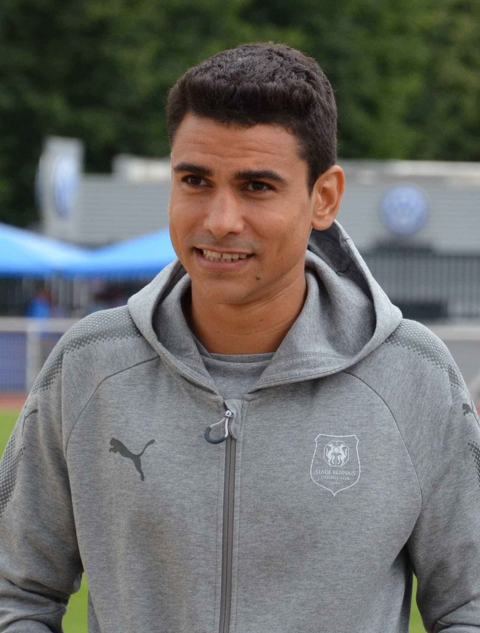 Photographie prise lors du match opposant le Stade rennais au SM Caen en match amical au stade Pierre-Compte de Vire le 22 juillet 2017. Ici, Benjamin André.